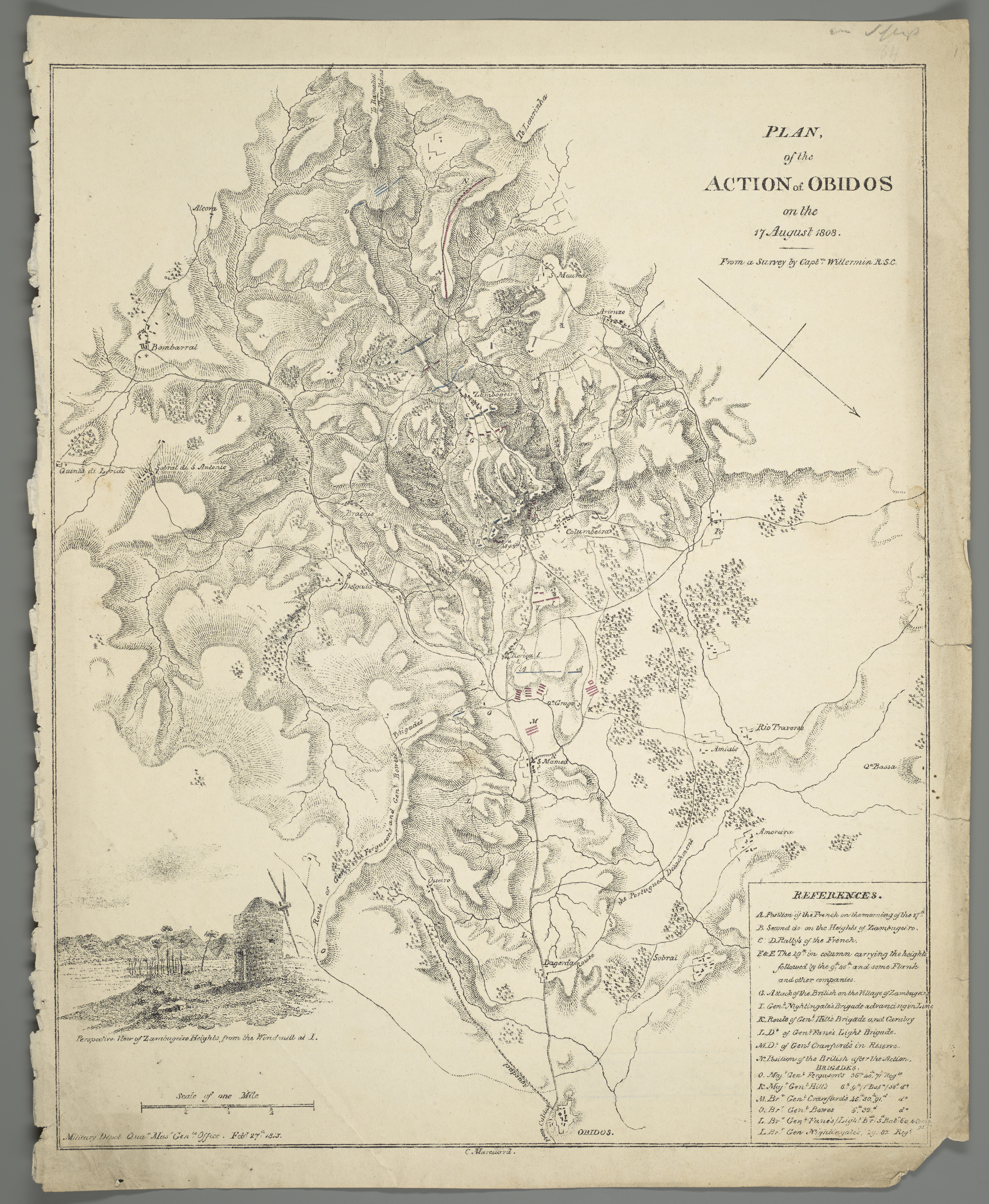 1 Kt. : teilw. kolor. (37 x 46 cm) ; Koordinaten W 9°13'54"-W 9°07'02"/N 39°21'54"-N 39°14'16" ; Maßstab in graph. Form (Mile). - Titel oben rechts. - Maßstab unten links. - SW oben. - Mit Truppenstellungen. - Erl. zu Truppenstellungen unten rechts. - Relief: Schraffen. - Erl. engl.